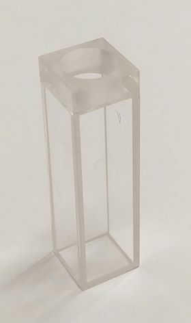 Kvartsist küvett, mis on erinevate laboratoorsete katsete teostamiseks.